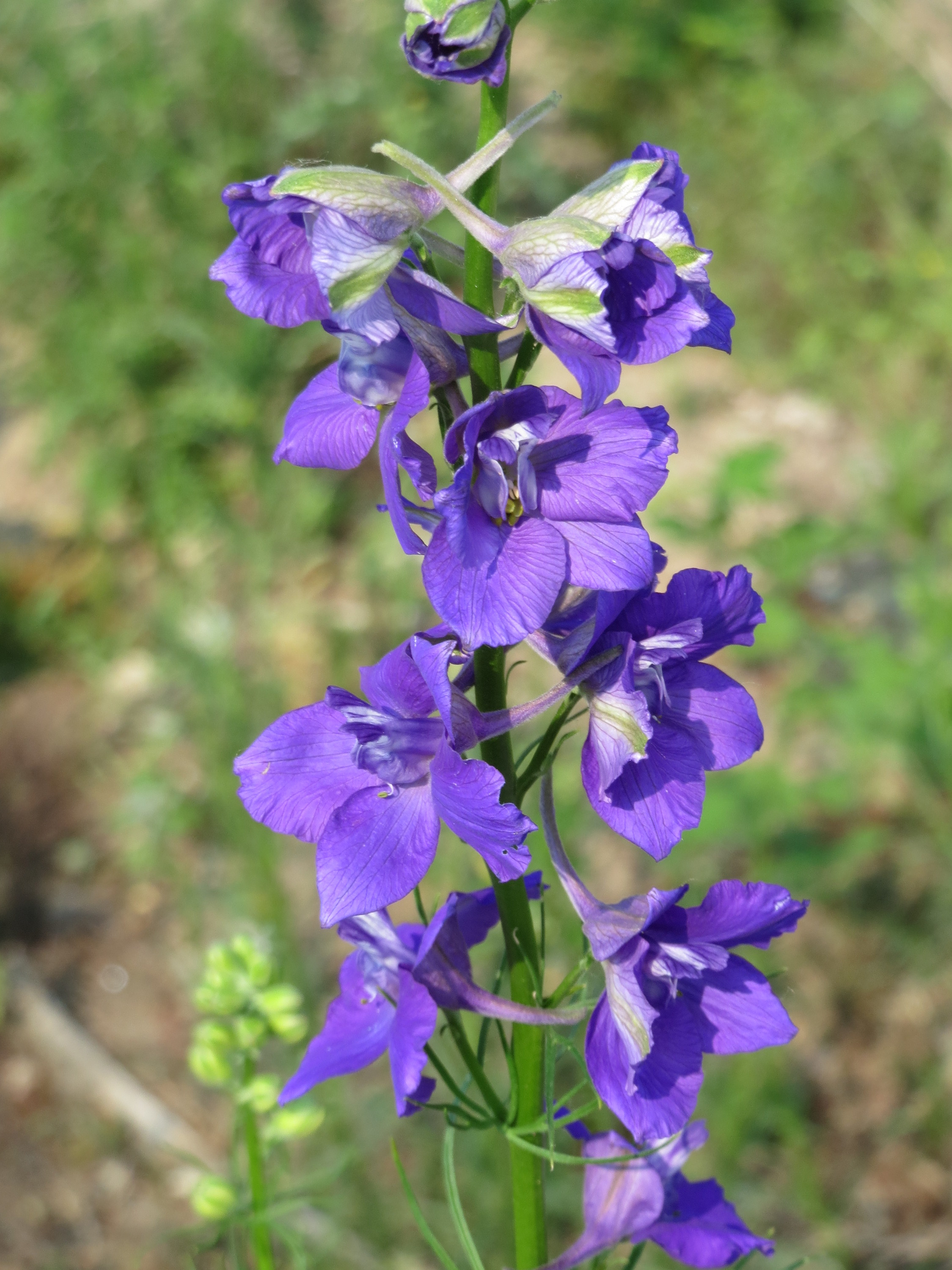 Garten-Feldrittersporn (Consolida ajacis) auf einem Schuttplatz bei Neulußheim (Gemarkung Altlußheim)